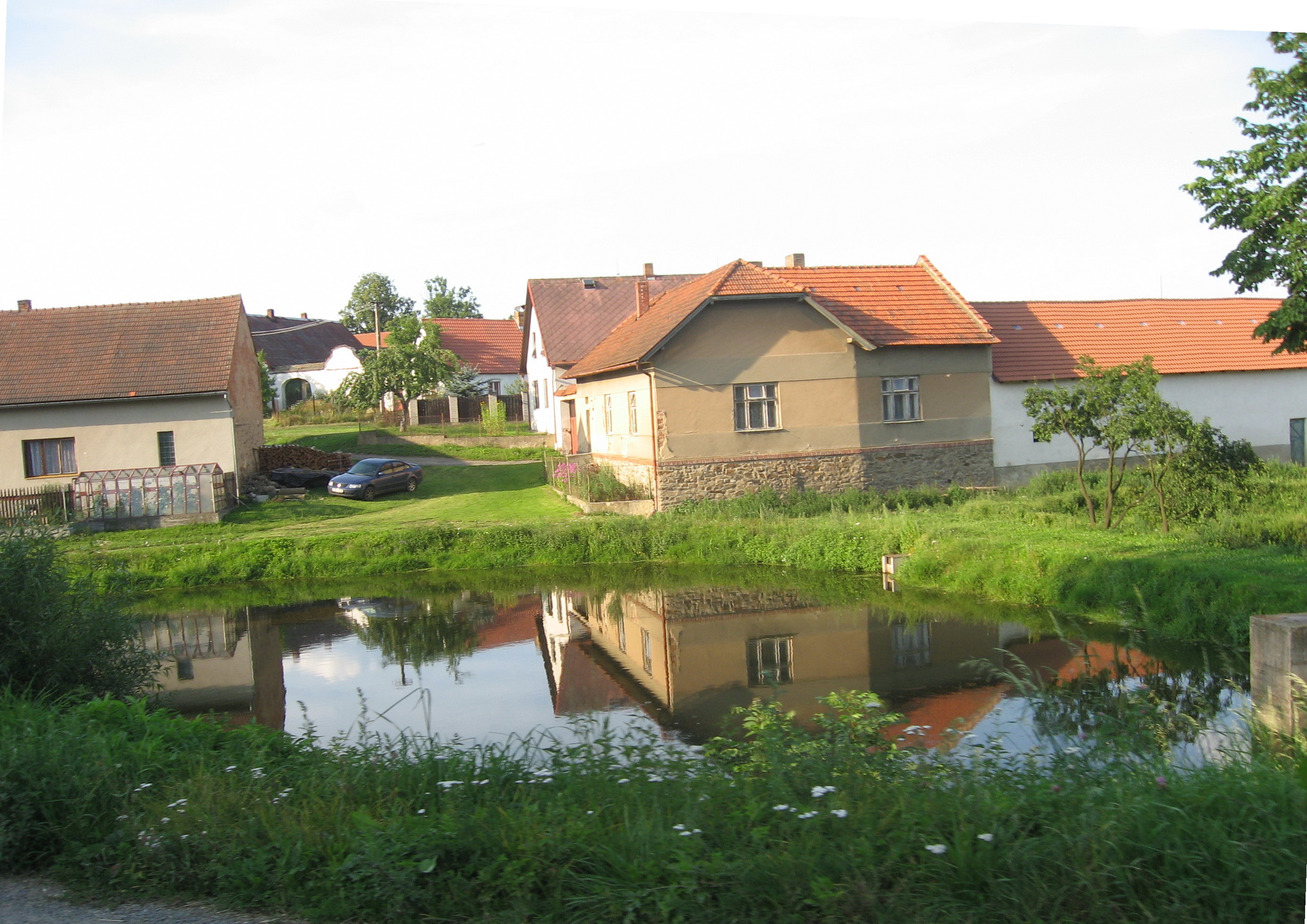 Svépravice